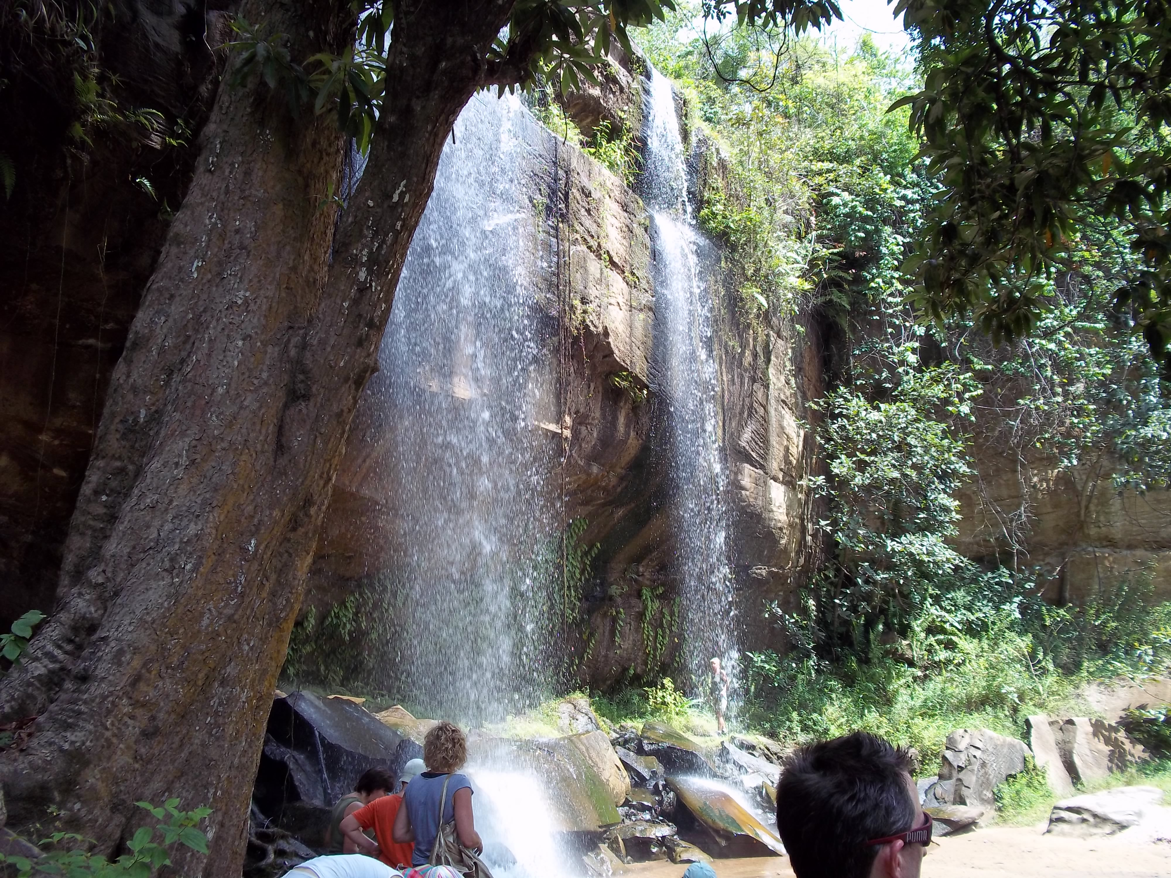 Sheldrick Falls in Kenya. Ein kleines, unscheinbares Flüsschen wird zu einem schönen Wasserfall.